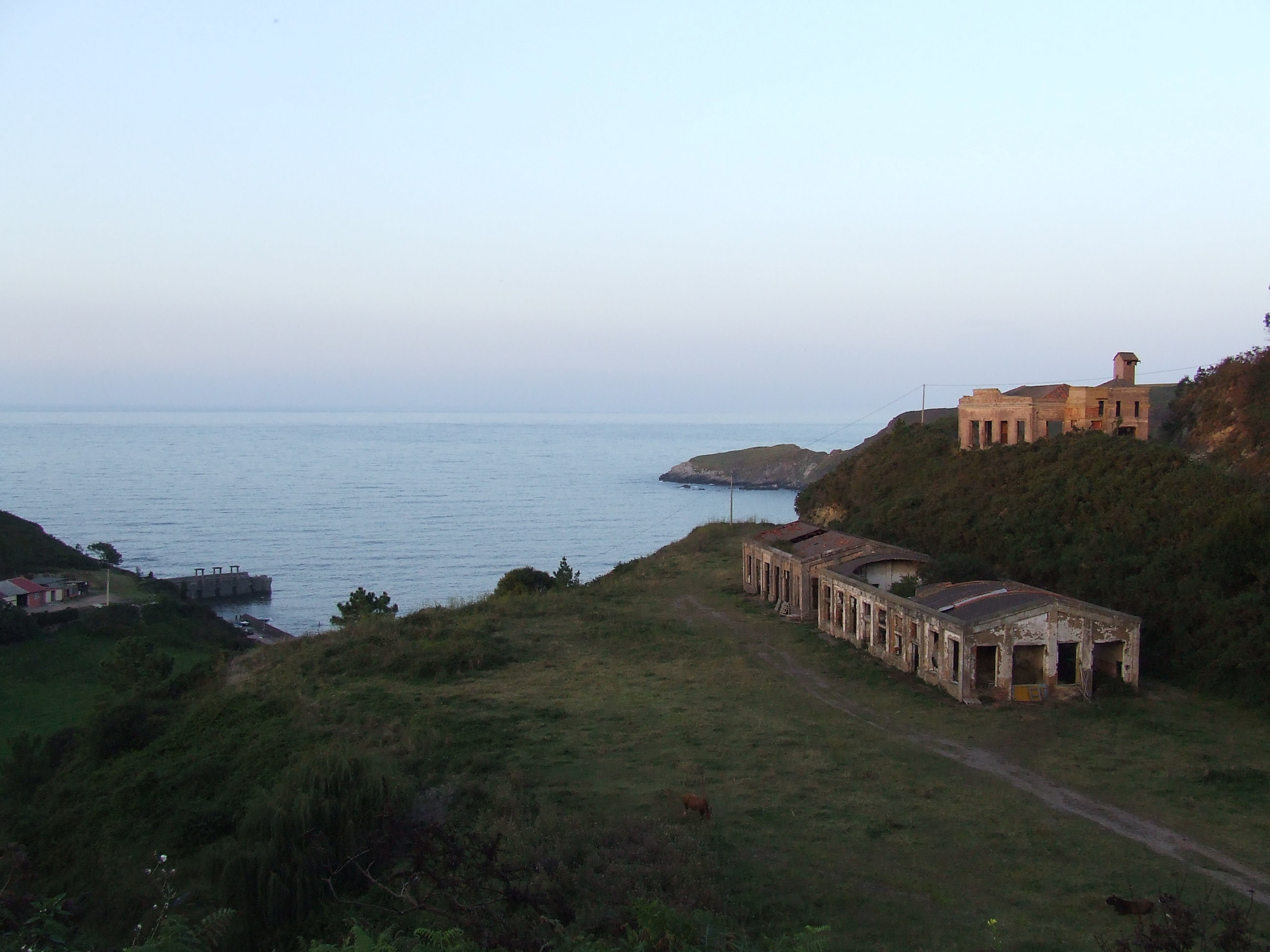 Edificios de la antigua mina de Llumeres en Bañugues (Gozón, Asturias)